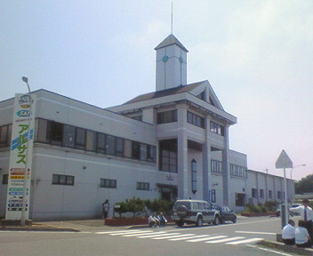 津軽海峡文化館「アルサス」（青森県ja:下北郡ja:佐井村）